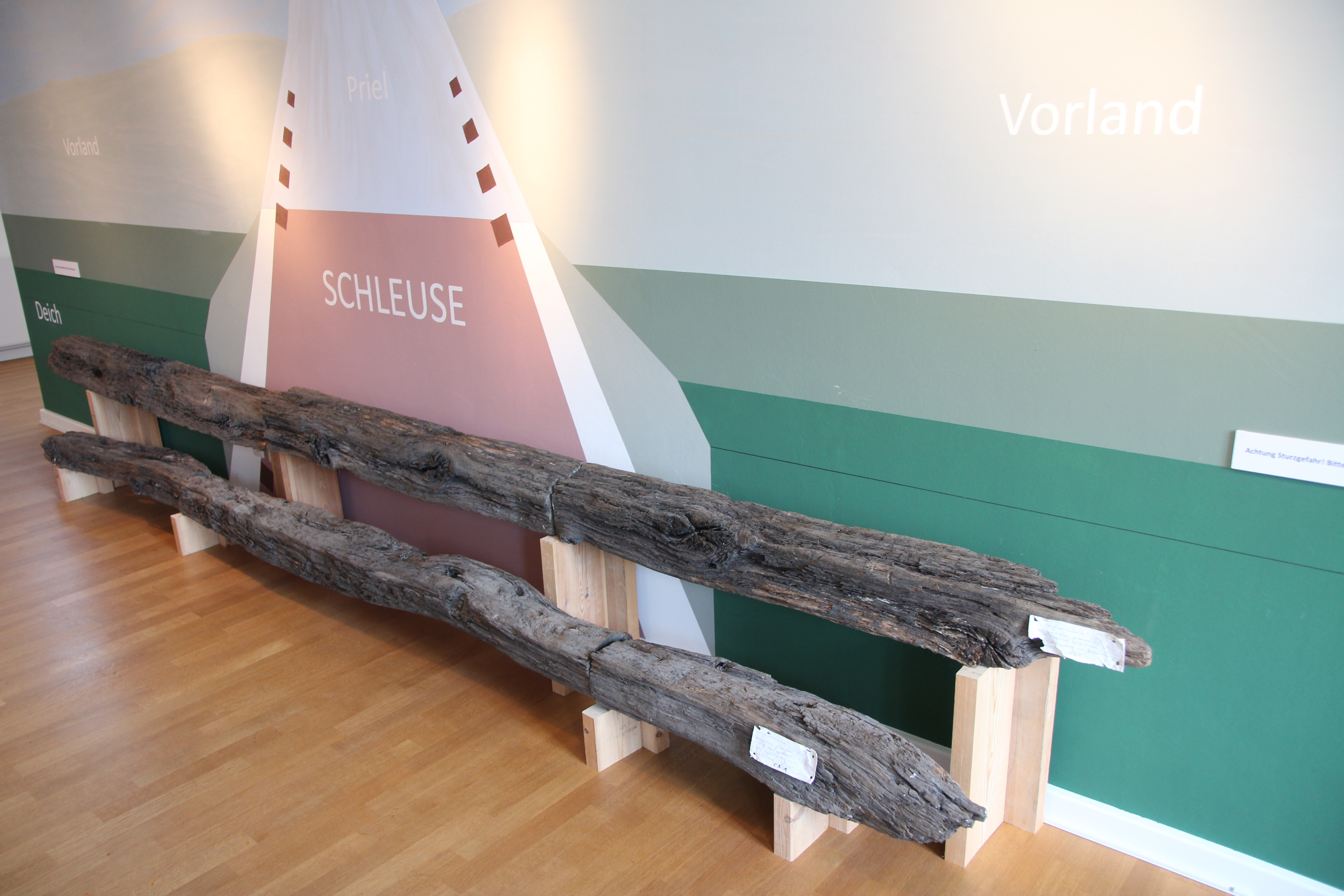 NordseeMuseum Husum (Nissen-Haus). "Schlesenblaken. Querbalken aus dem inneren Vorsiel der 'jüngeren' Schleuse." 1961 geborgen, erste Hälfte 14. Jahrhunderts (Rungholter Kammer).